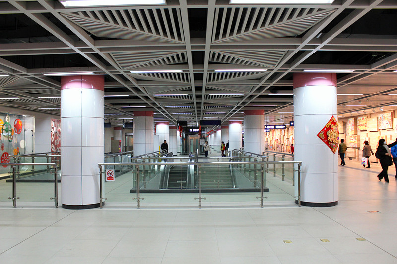 中文（中国大陆）: 武汉地铁2号线